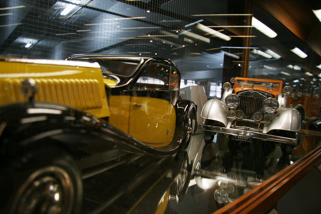 Milla Museos